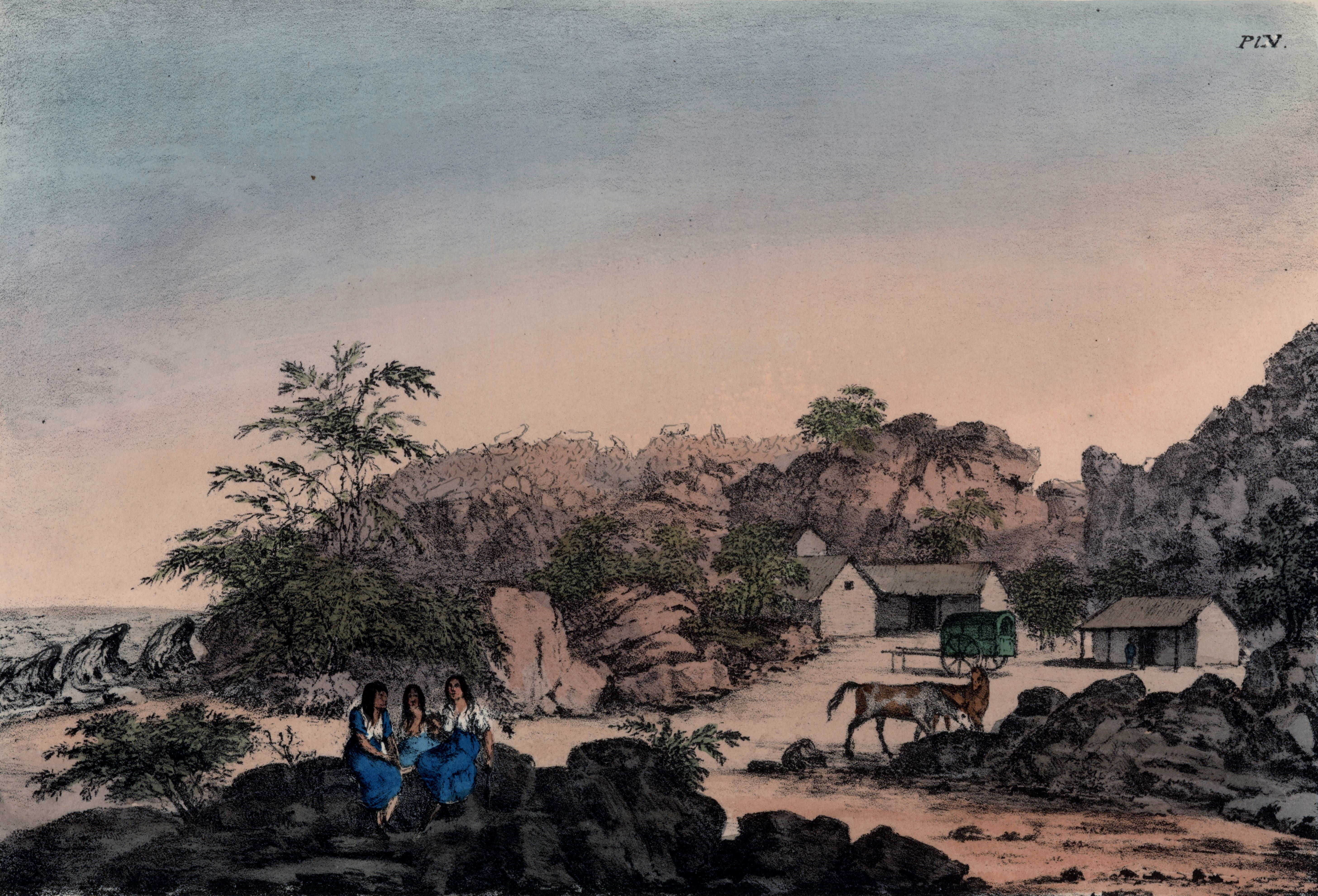 Vista del pueblo chileno de Portezuelo, litografía coloreada de Agostino Aglio según dibujo (de quién es este último, no se dice); impresa por Rowney & Forster y publicada en el libro del viajero y filántropo inglés Peter Schmidtmeyer Travels into Chile, over the Andes, in the years 1820 and 1821, London: Longman, Hurst, Rees, Orme, Brown and Green, 1824.